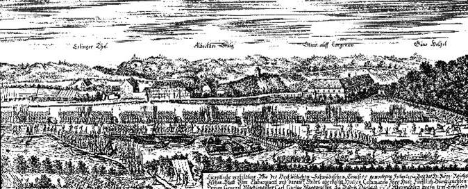 Abtransport der Schwäbischen Kreistruppen 1684 von Ulm aus. Unten auf der Donau Ulmer Schachteln und Flöße mit Wagen und anderem Transportgut.